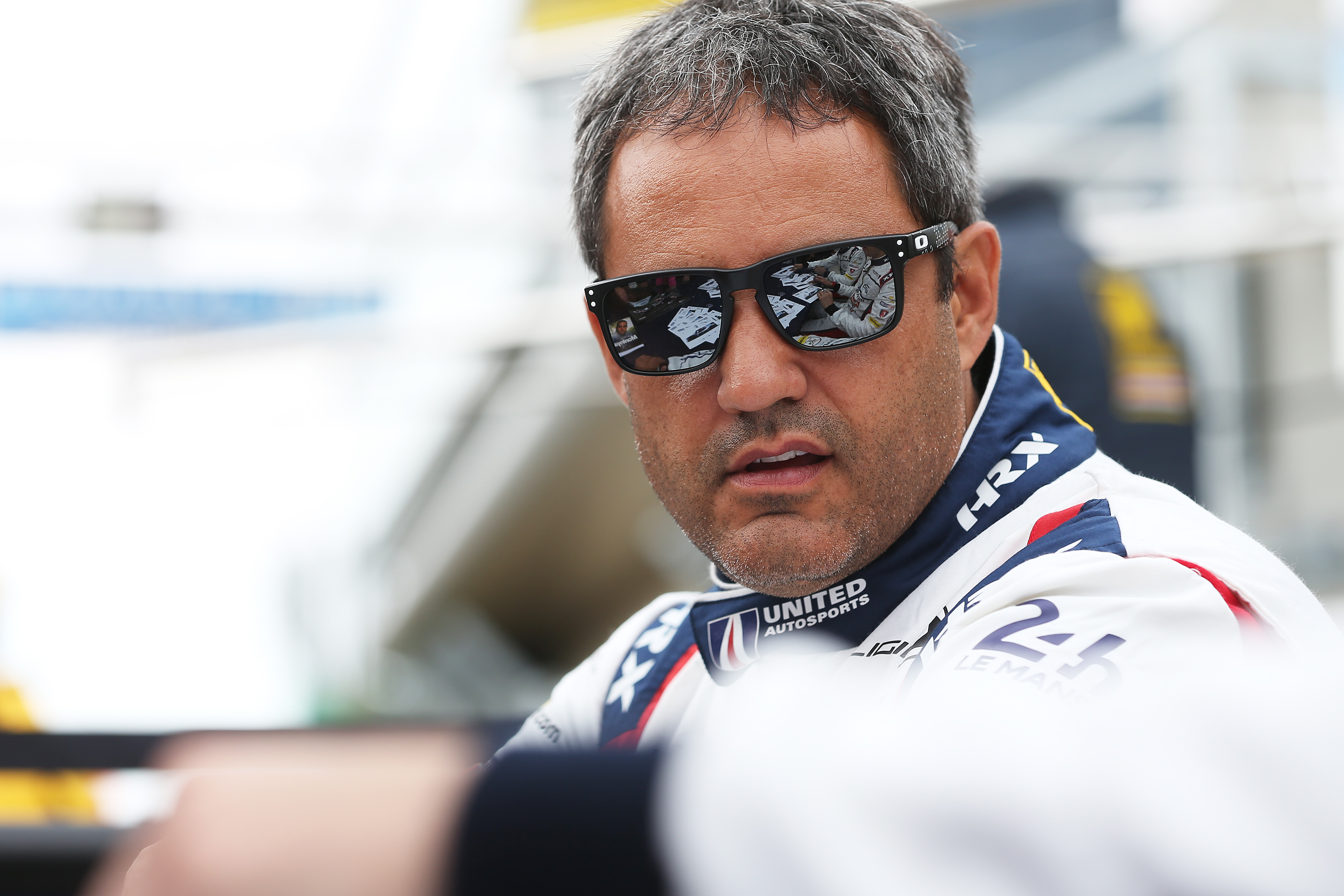 United Autosport lors des 24 Heures du Mans 2018.